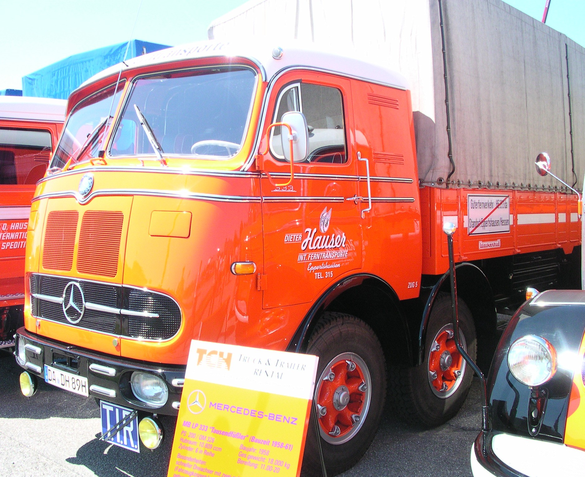 Mercedes LP 333 "Tausendfüßler", Baujahr 1958, 10809 ccm Hubraum, 6 Zylinder, 147 kW (200 PS) in Wörth am Rhein beim Oldtimer-Treffen bei Daimler-Chrysler